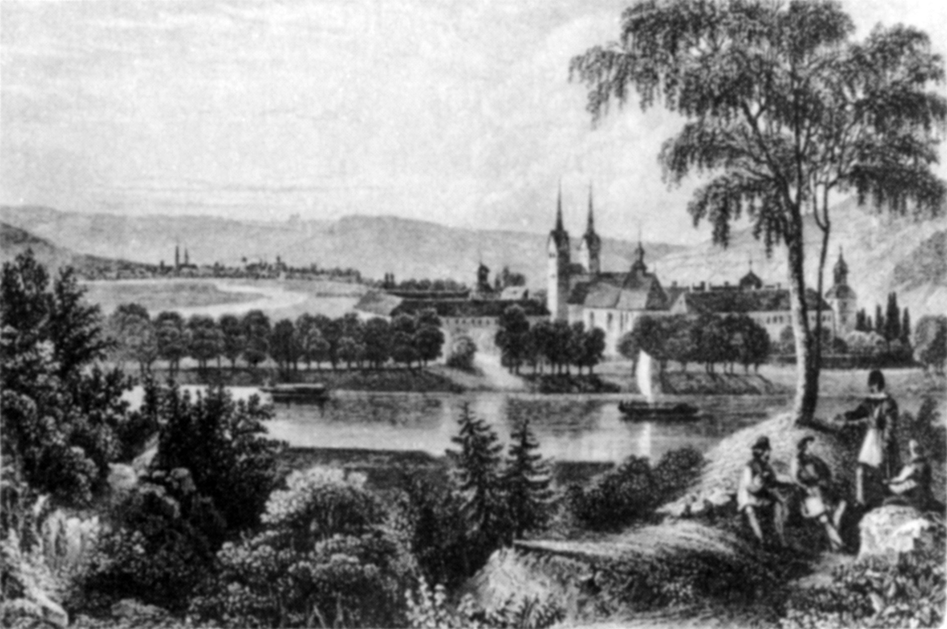 Schloß Corvey und Höxter um 1840. Bild aus Das malerische und romatische Westfalen 1. Aufl. [1]